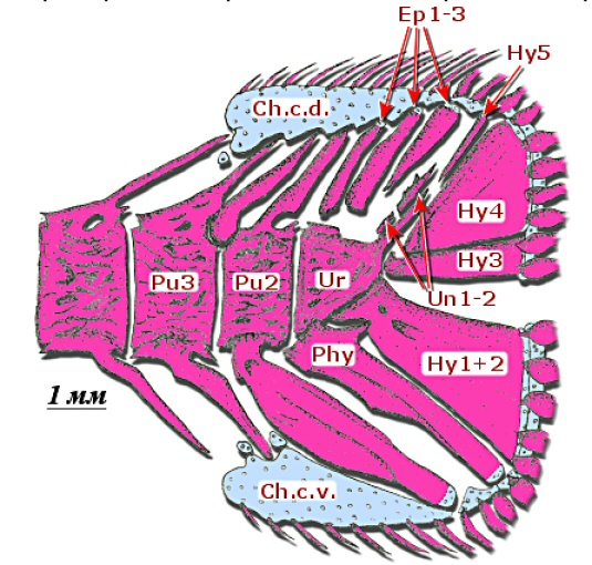 Caudal fin skeleton in Notohteniops tchizh (fam. Nototheniidae), Ob' Seamount, Antarctica: drawing of alizarin red S-stained preparation